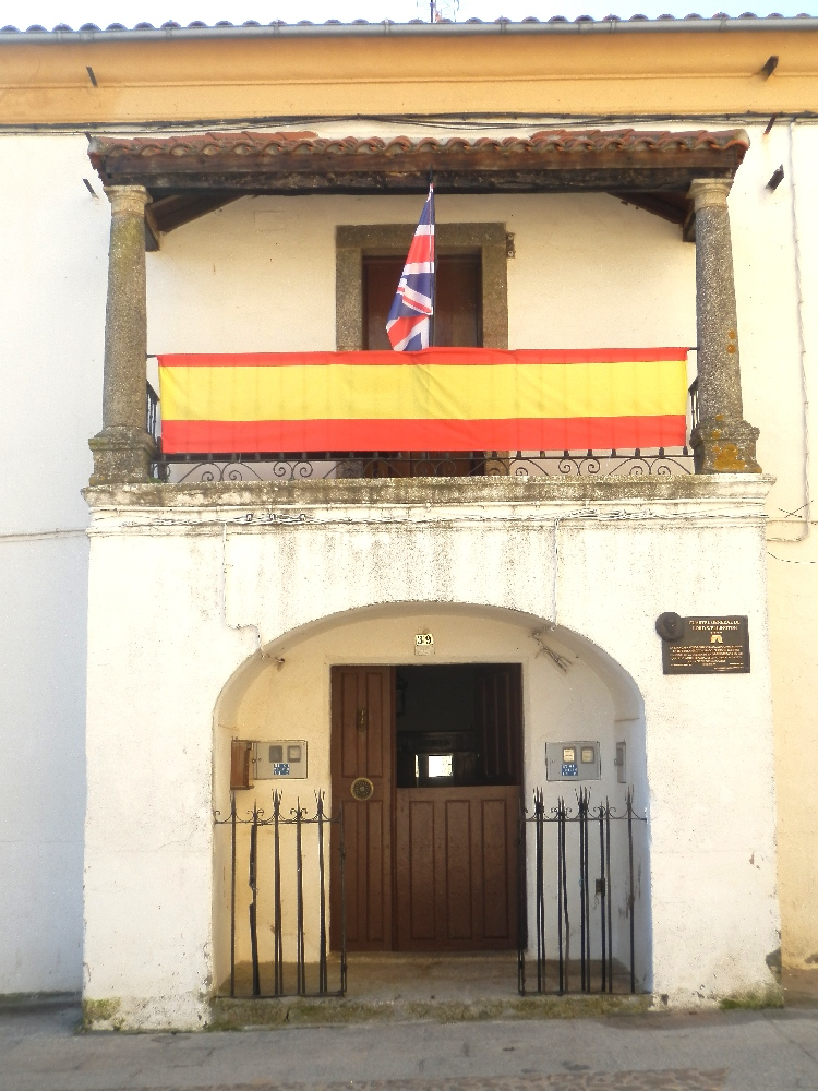 Portal de entrada a la casa donde vivió Lord Wellington en Fuenteguinaldo